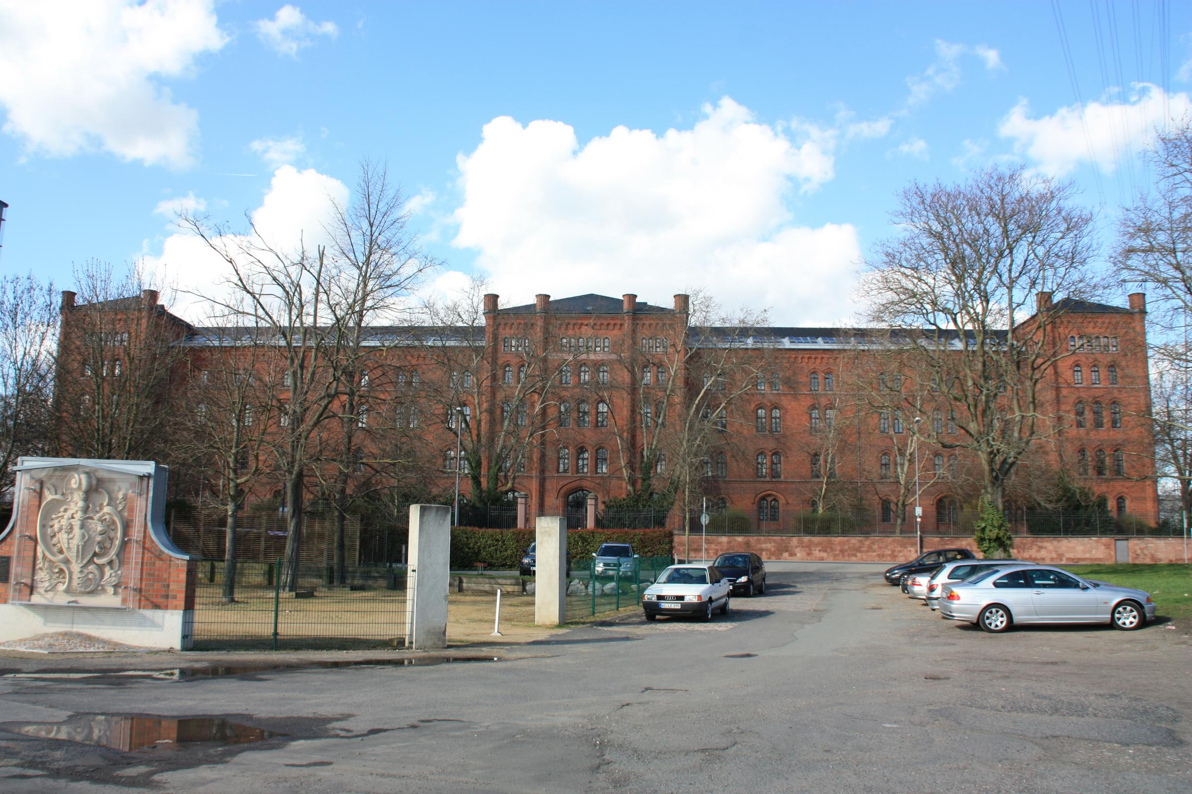 Das Gebäude der Rheinkaserne in Biebrich, Wiesbaden; links der Albert-Wappenstein von 1890